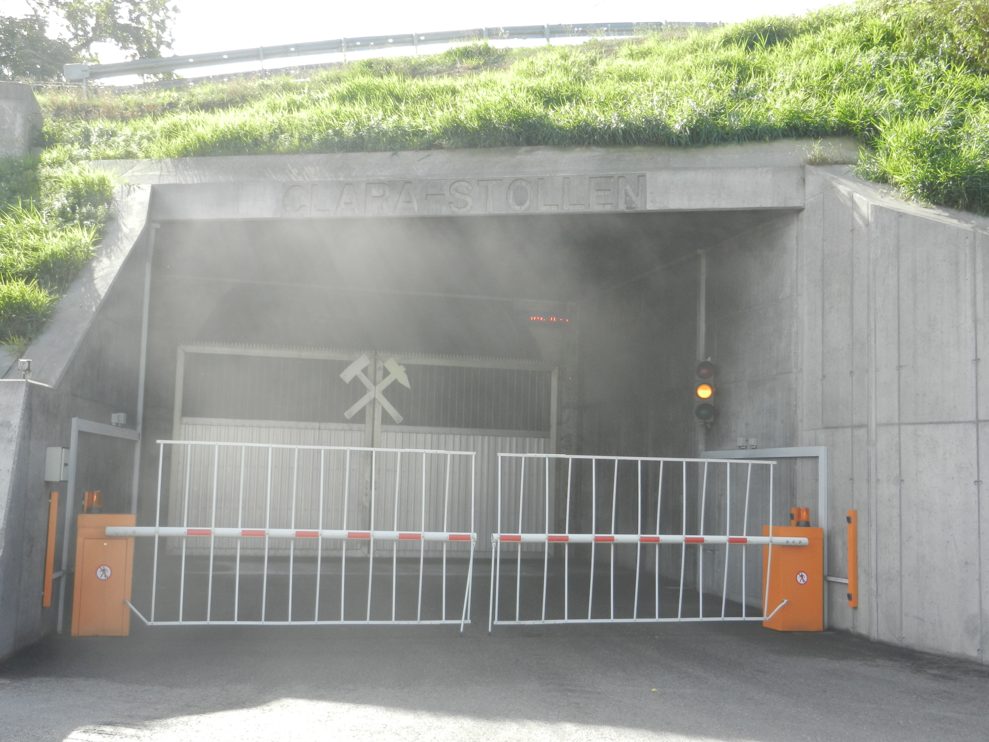 Salzbergwerk Stetten bei Haigerloch, Clarastollen (Zufahrt für LKW und Busse)